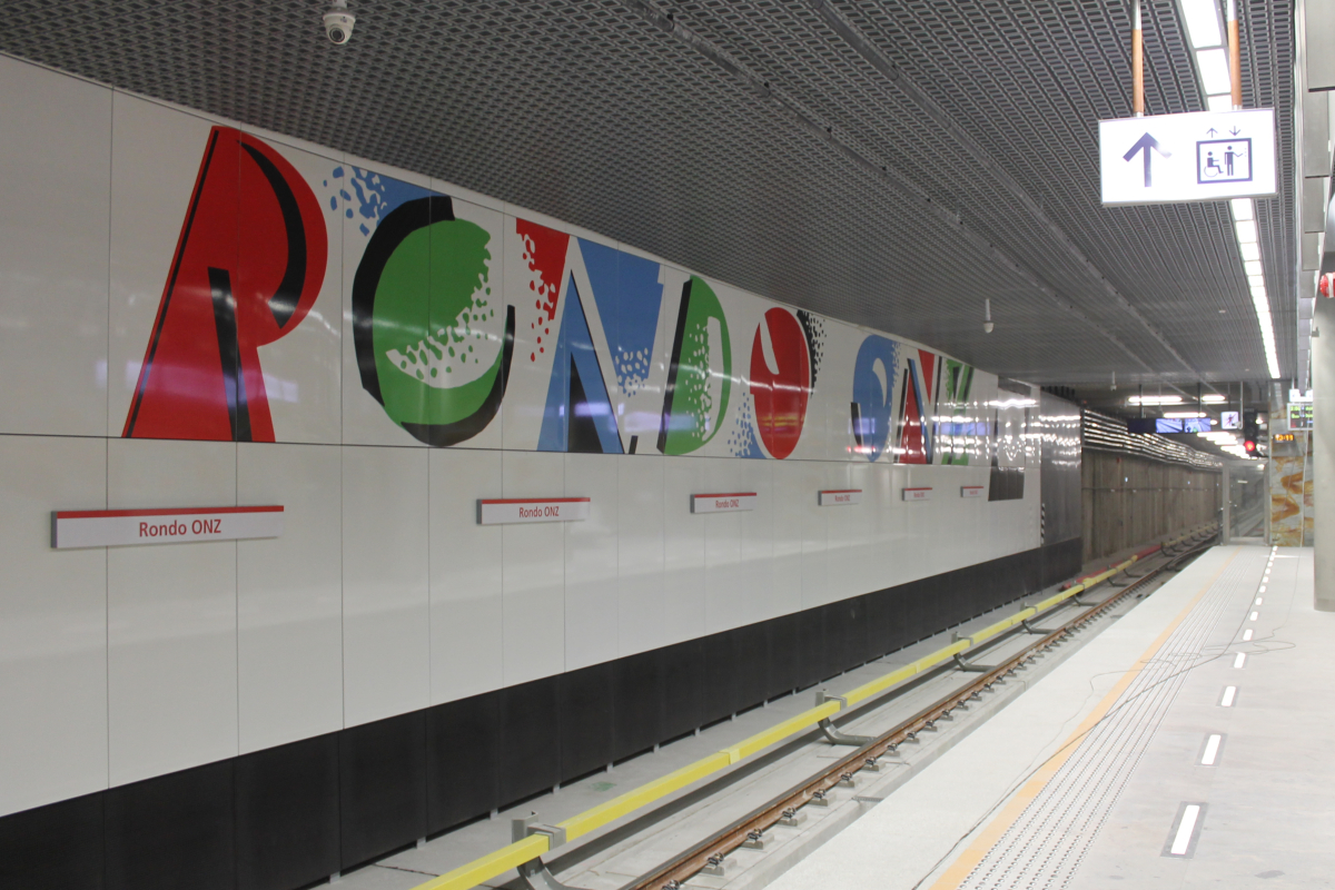 Ściana zatorowa na stacji C10 Rondo ONZ. - Opracowanie graficzne Wojciech Fangor